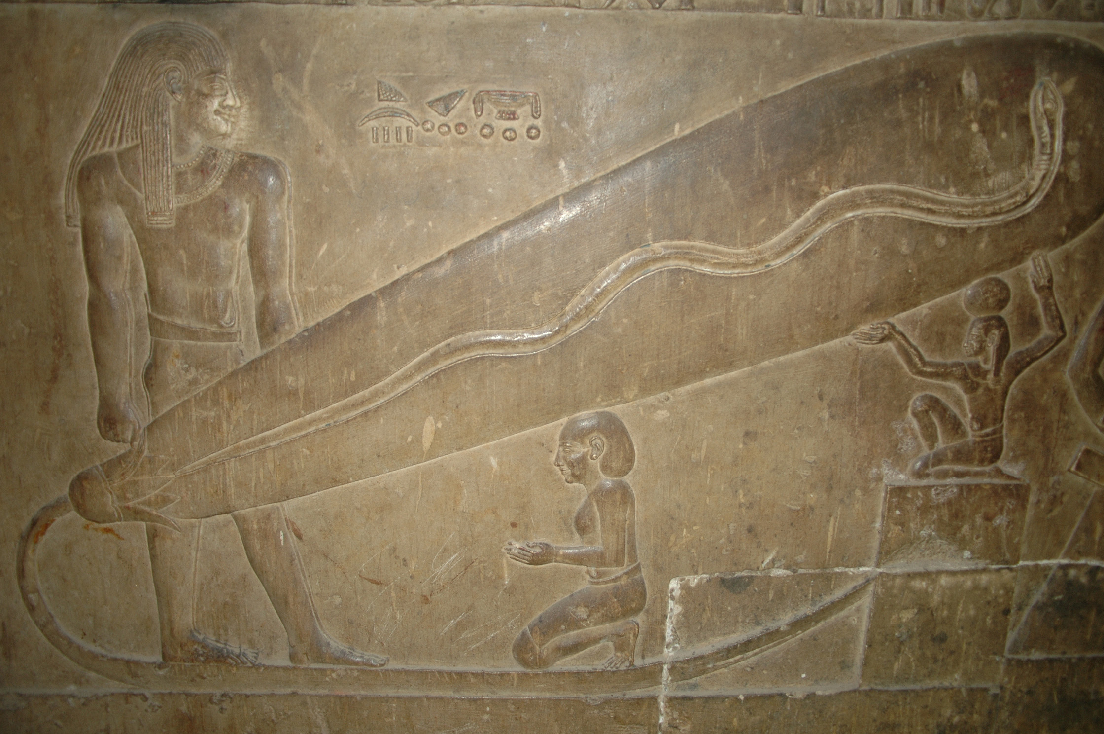 Das Foto zeigt den linken Teil eines Reliefs in der Krypta des Hathor Tempels zu Dendera. (Ägypten) Autor: Alf Kontermann, eigenes Werk. Das Foto wurde am 19.September 2006 aufgenommen.